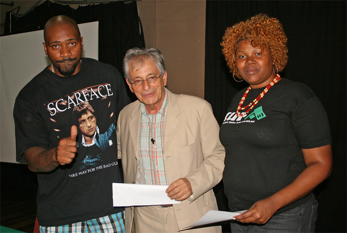 MV Bill, Fernando Gabeira e Nega Gizza logo após a assinatura do termo de compromisso.